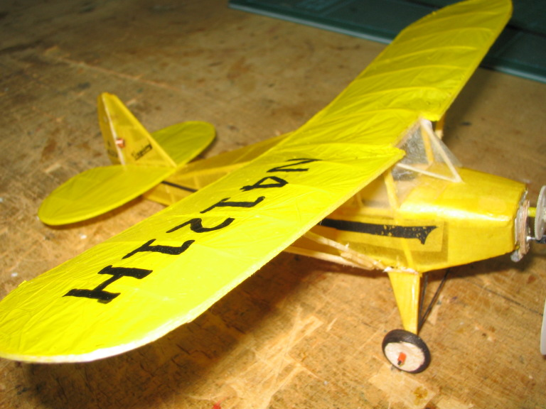 Modèle à l'échelle pistachio d'unPiper Vagabond, envegure 8" poids 3,6g.